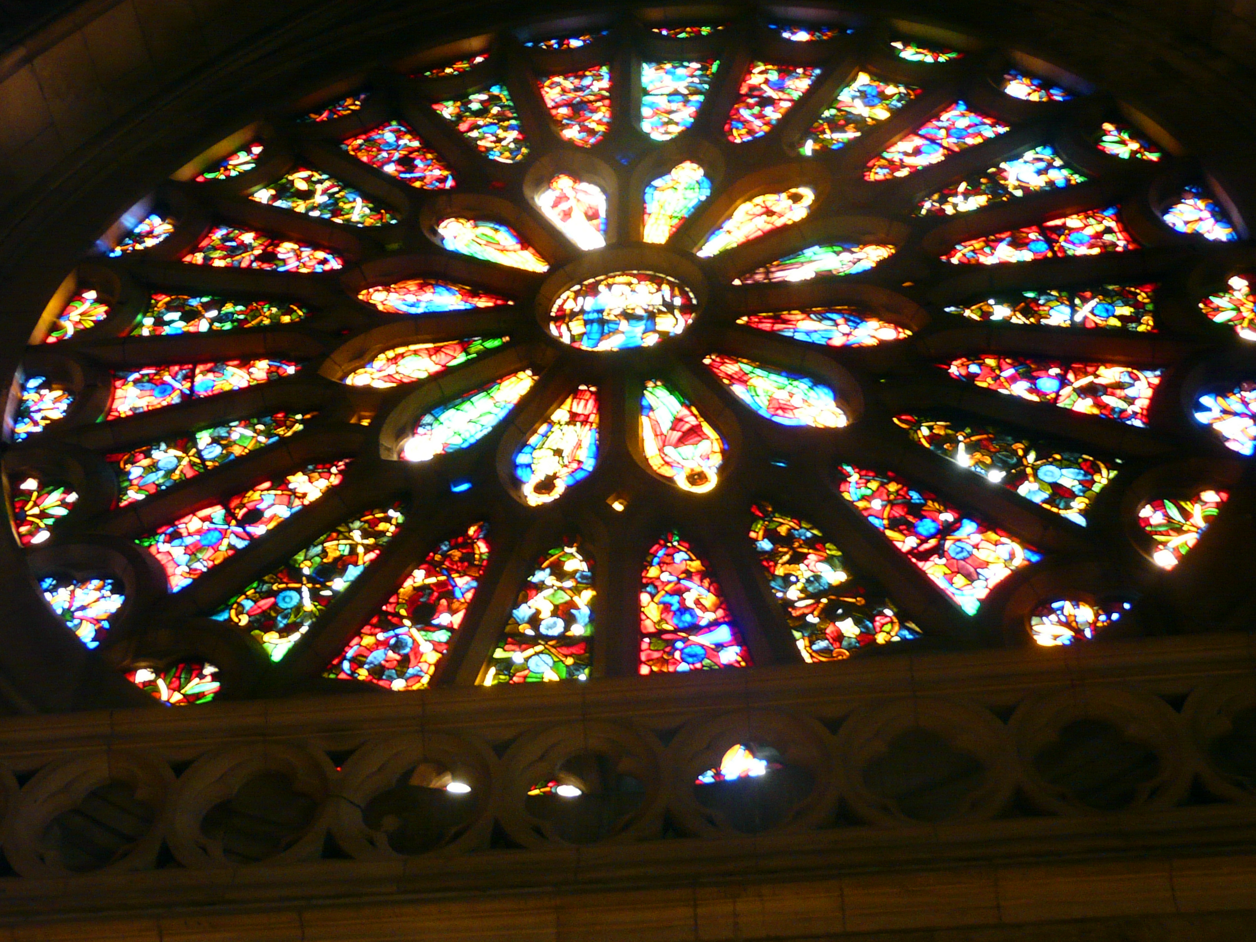 Rosetón occidental, catedral de León